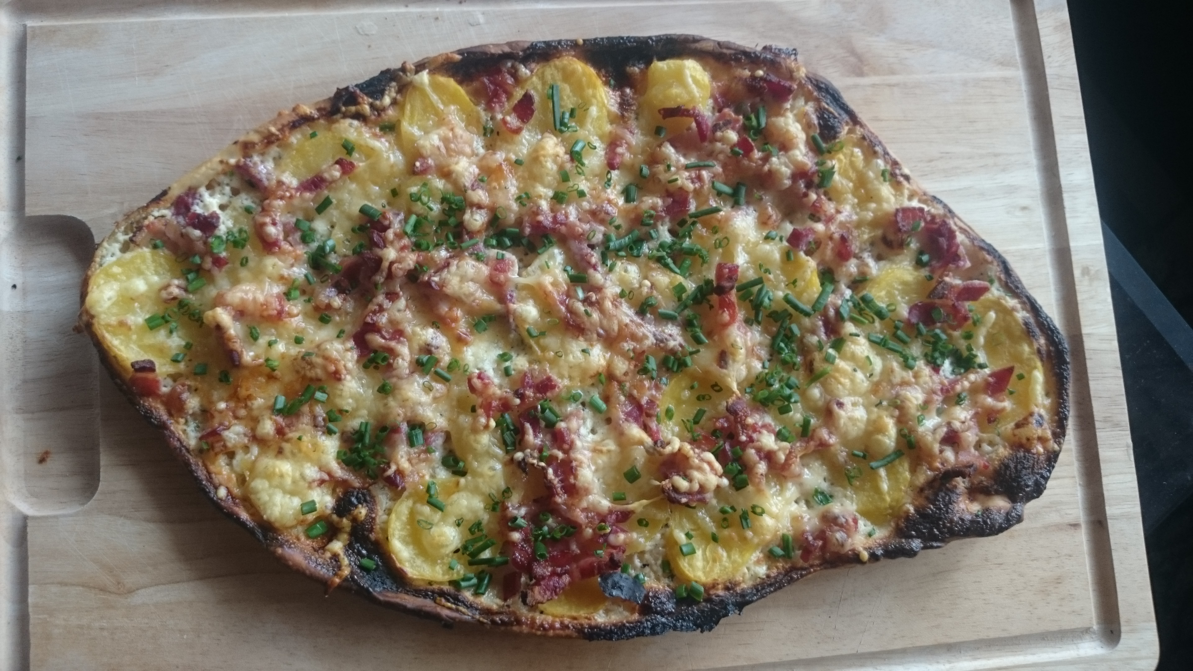 Dinnete mit Kartoffeln, Speck und Emmentaler-Käse